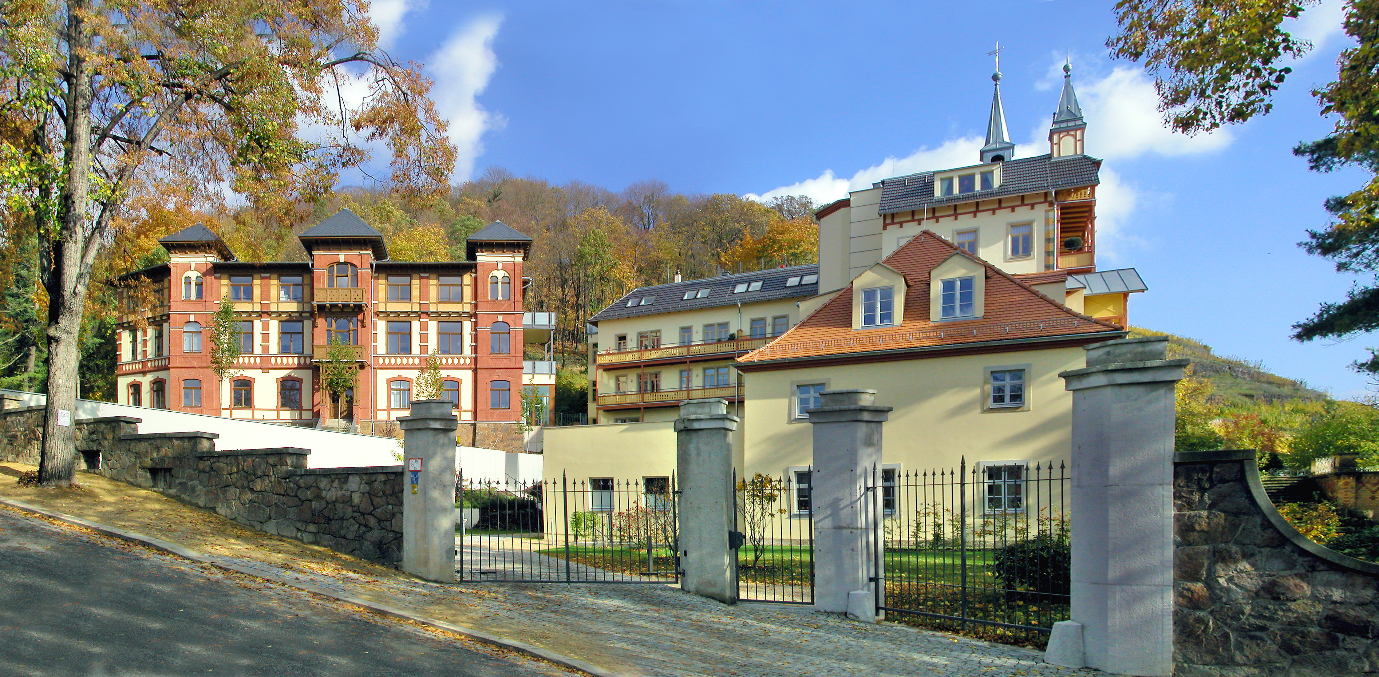 23.10.2008 01445 Radebeul: Ehem. Bilz Sanatorium, Eduard-Bilz-Str. 53 (ehem. Strakenweg 86). Erbaut 1895, 2006 zu Luxuswohnungen saniert. [DSCN34858-34859.TIF]20081023220MDR.TIF&JPG(c)Blobelt